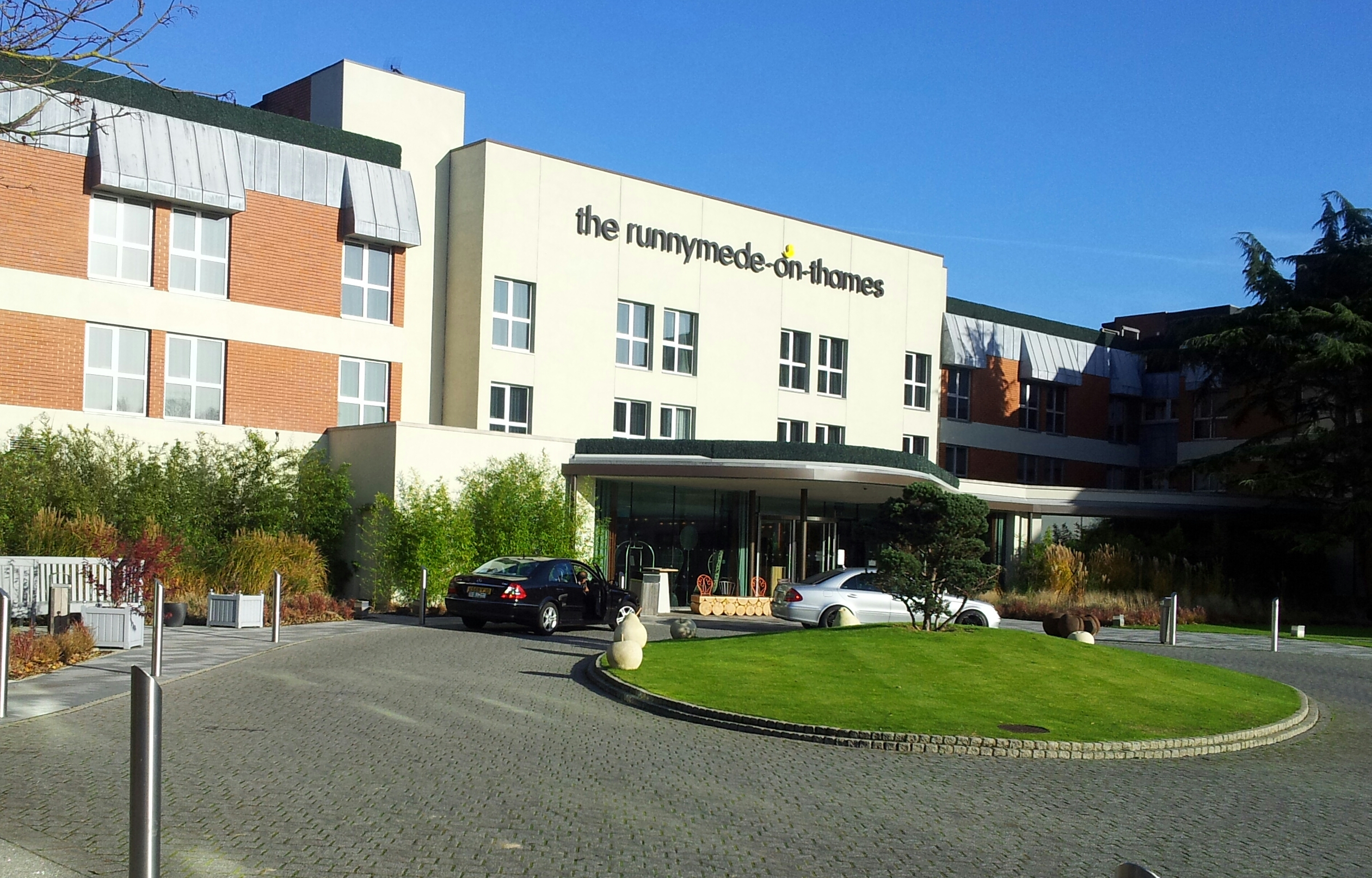 Runnymede Hotel